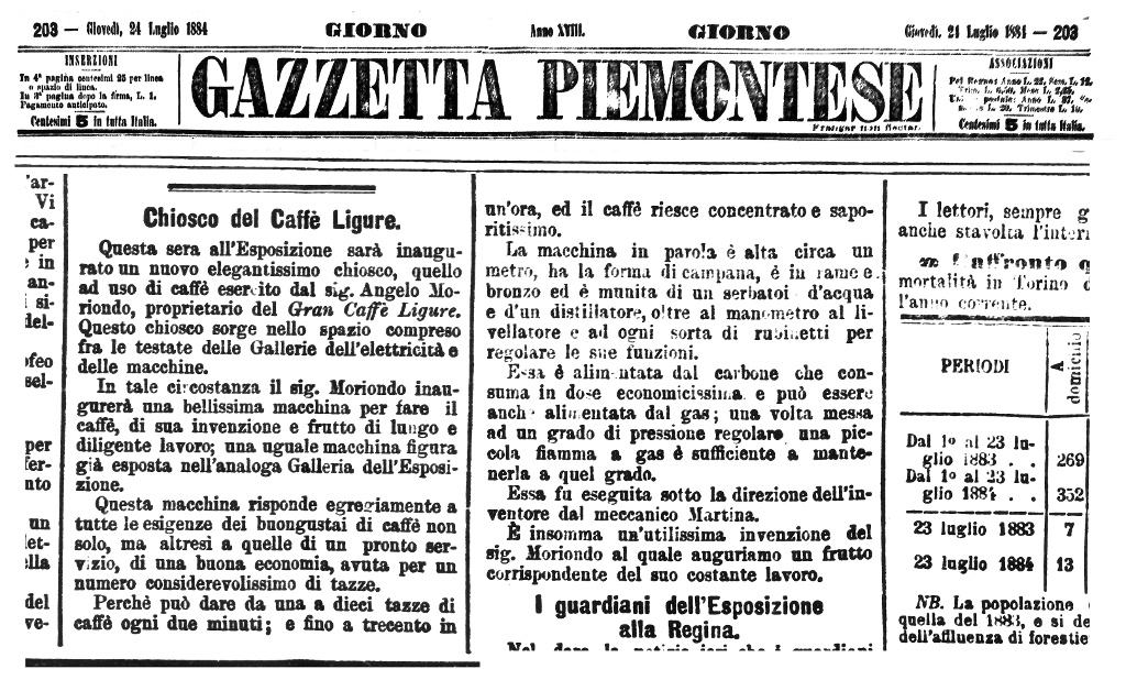 Articolo su Angelo Moriondo estratto dalla Gazzetta Piemontese del 21 luglio 1884